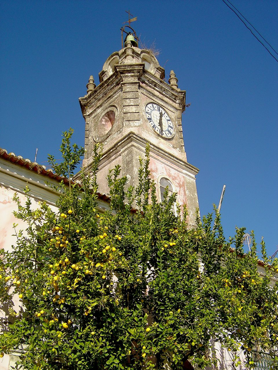 Arruda dos Vinhos